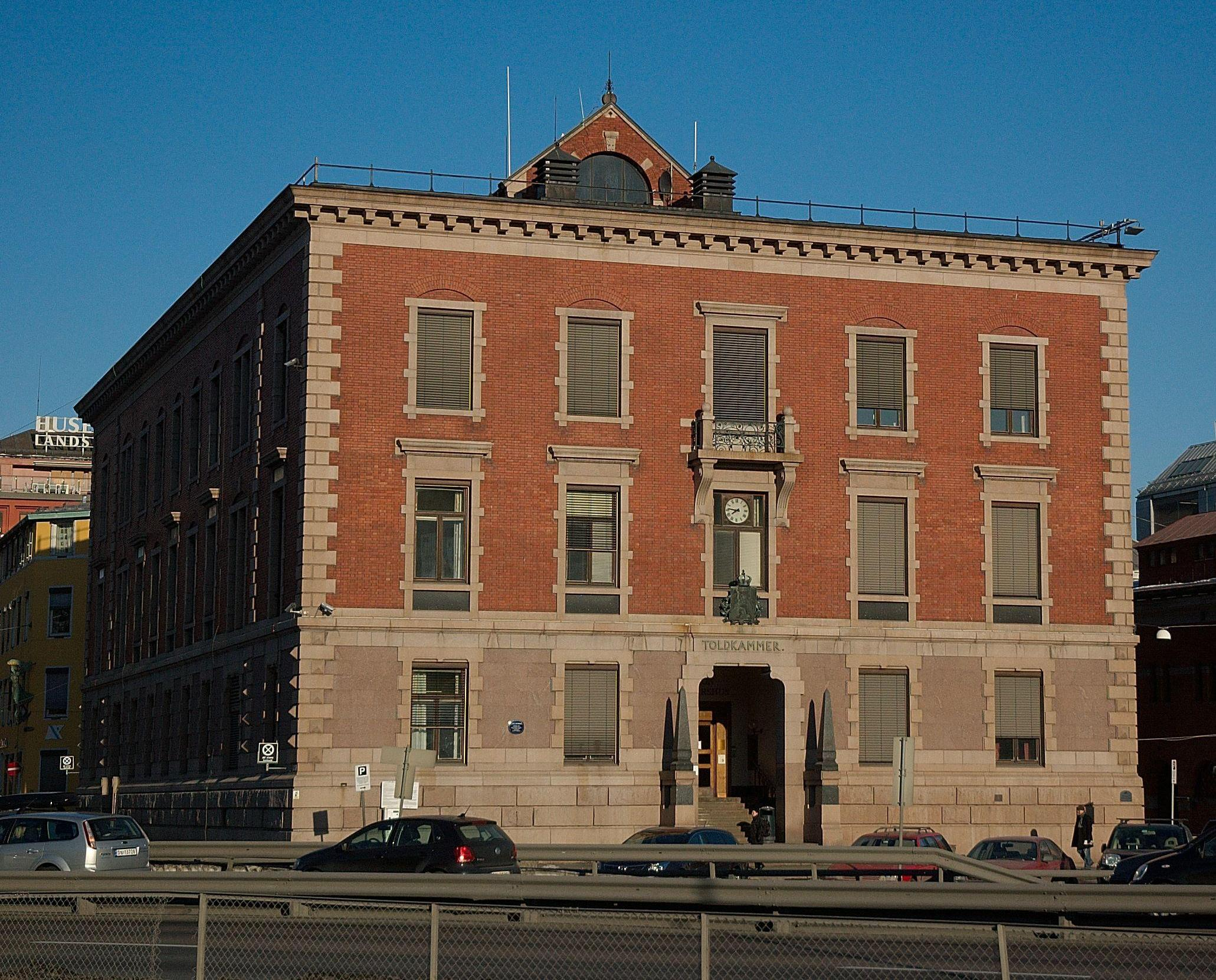 Tollboden i Oslo av Adolf Schirmer og bygget i 1896.